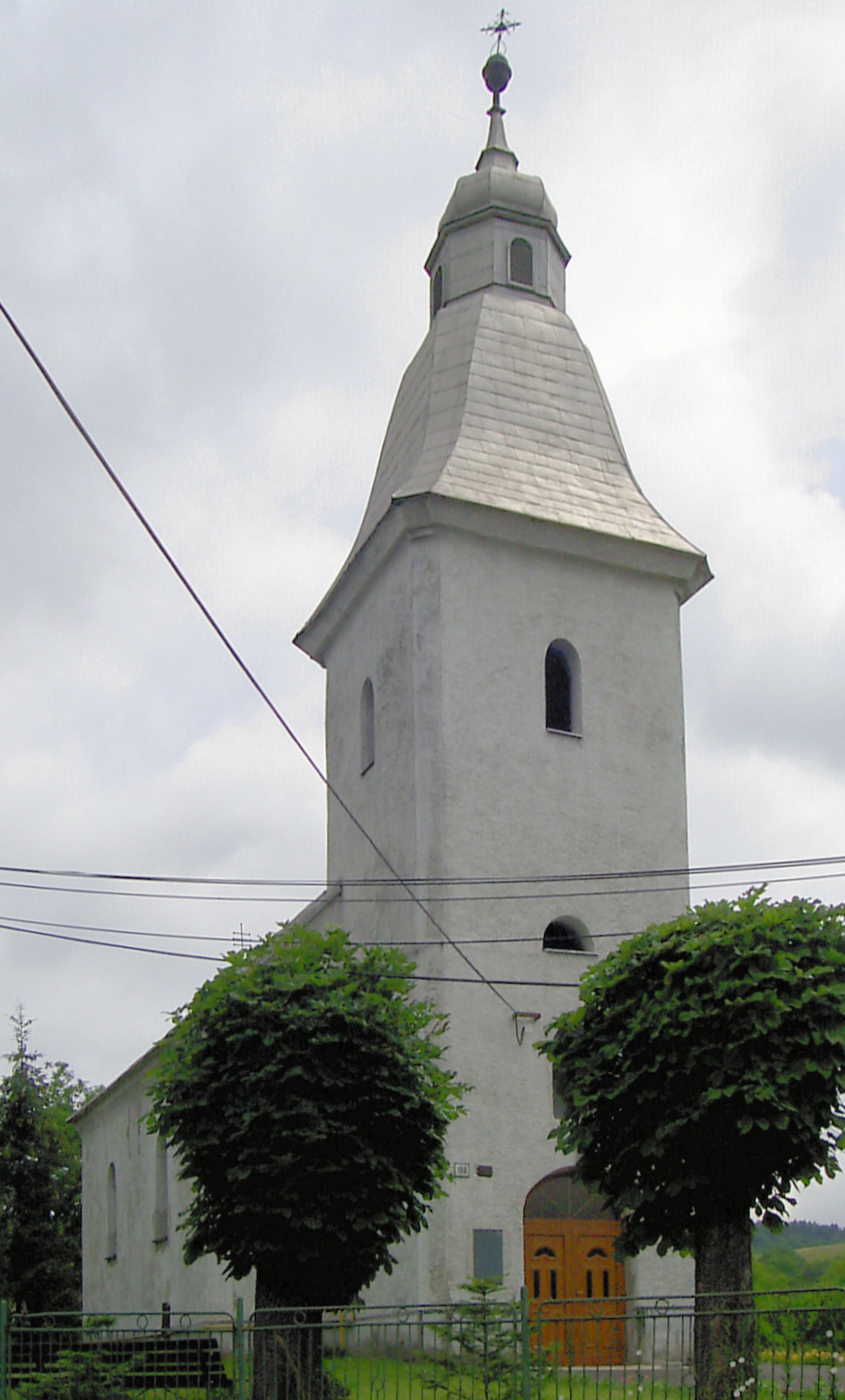 Grécko-katolícky chrám Nižný Hrabovec